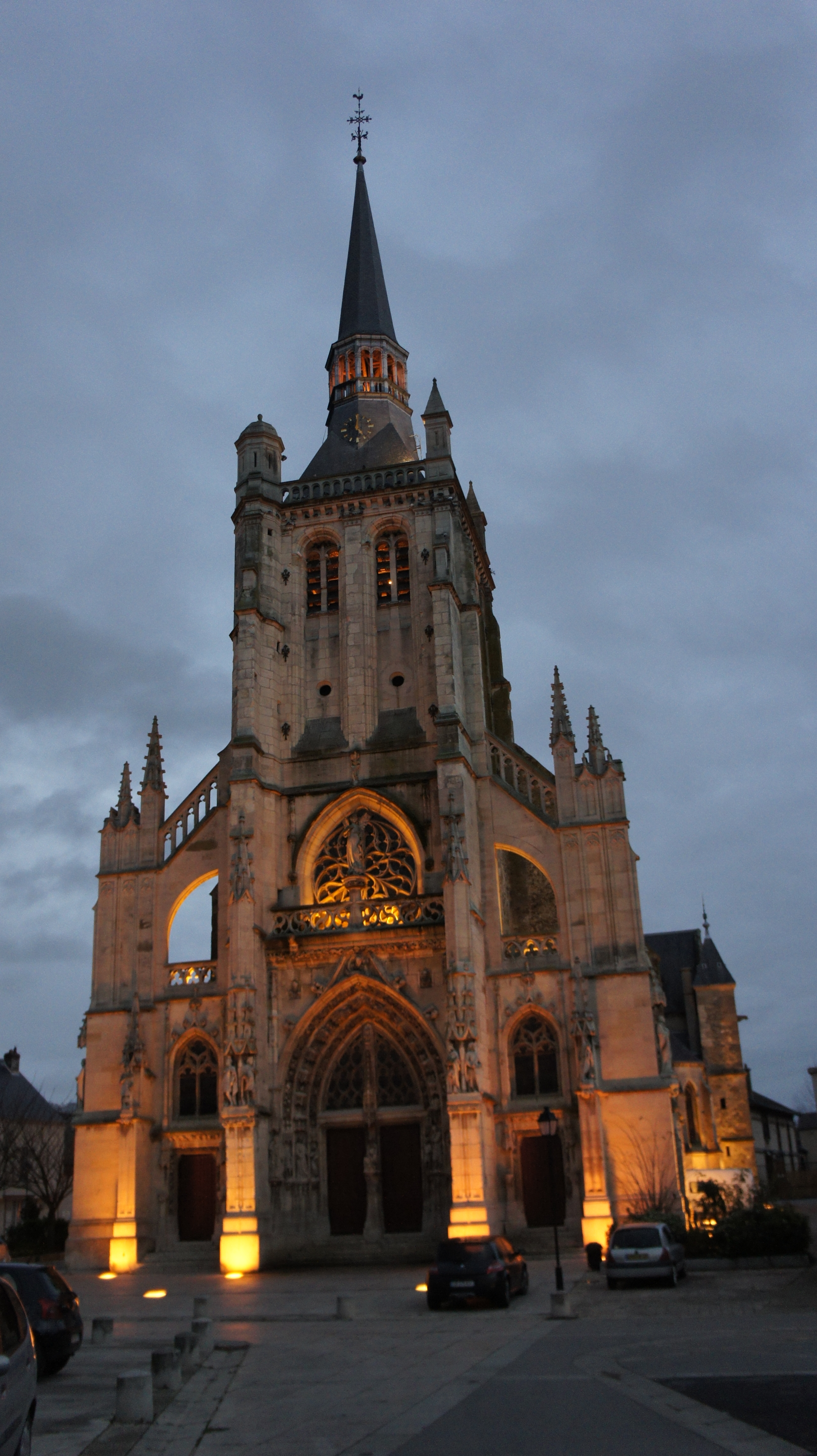 L'égile avec son éclairage nocturne .